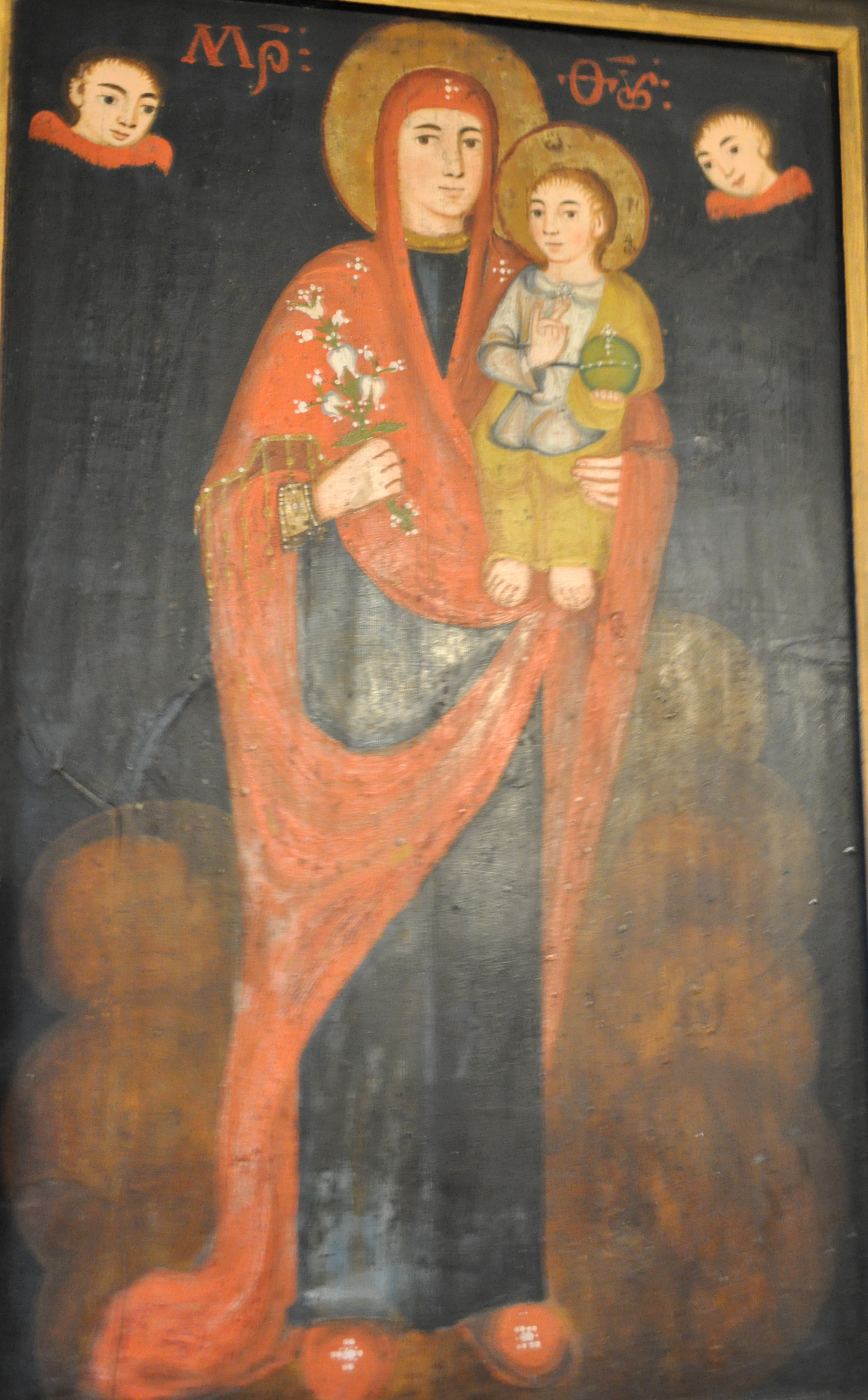 Biserica de lemn "Cuvioasa Paraschiva", sat DOBREŞTI; comuna BARA